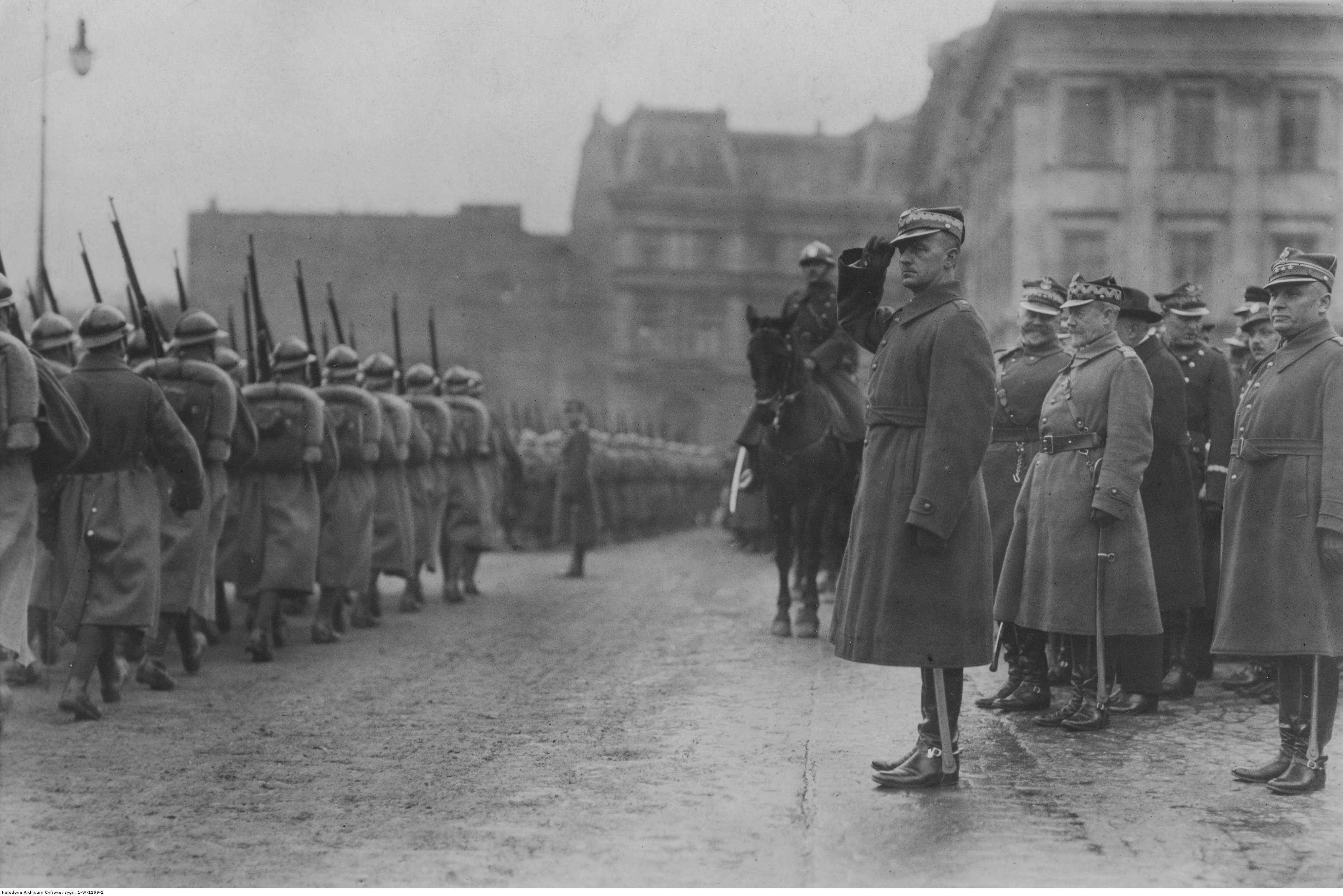 Święto 21 pułku piechoty w Warszawie; listopad 1925. Defilada pułku na pl. Saskim. Widoczni m.in. gen. Władysław Sikorski (salutuje), gen. Daniel Konarzewski (2 z lewej), gen. Lucjan Żeligowski (3 z lewej). Koncern Ilustrowany Kurier Codzienny - Archiwum Ilustracji. Sygnatura: 1-W-1199-1